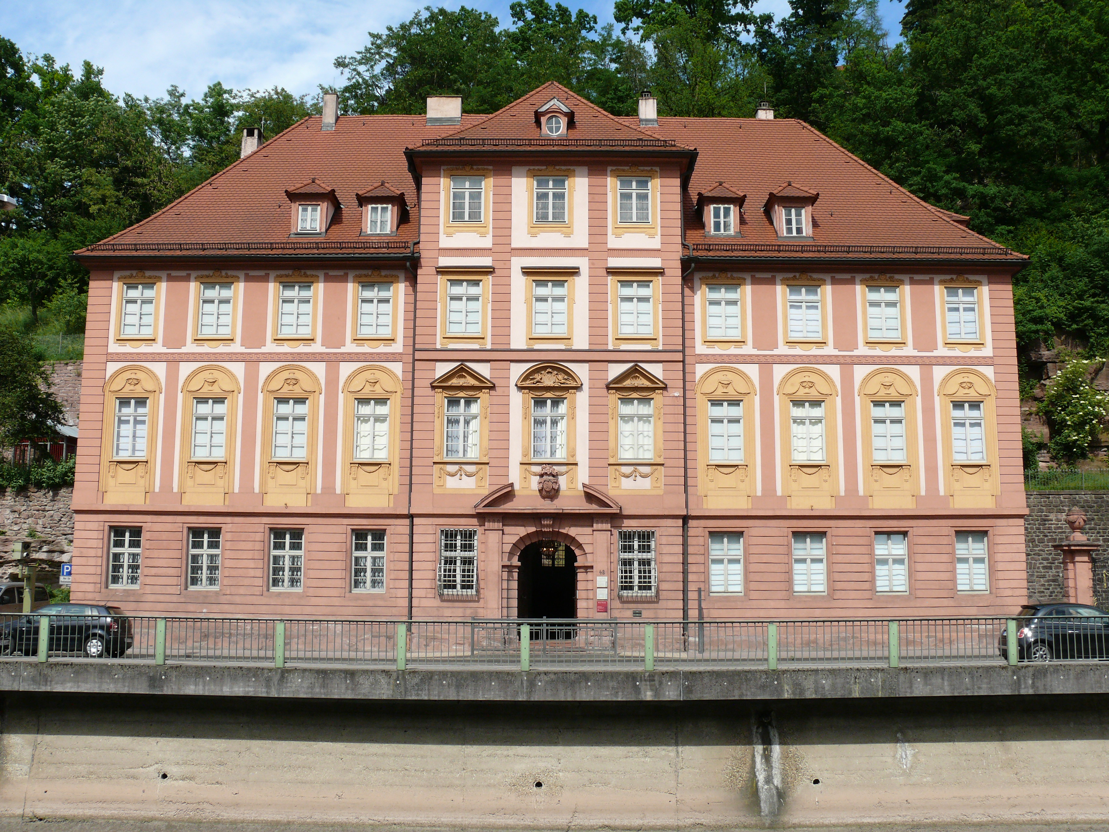 Das Palais Vischer in Calw, direkt an der Nagold.